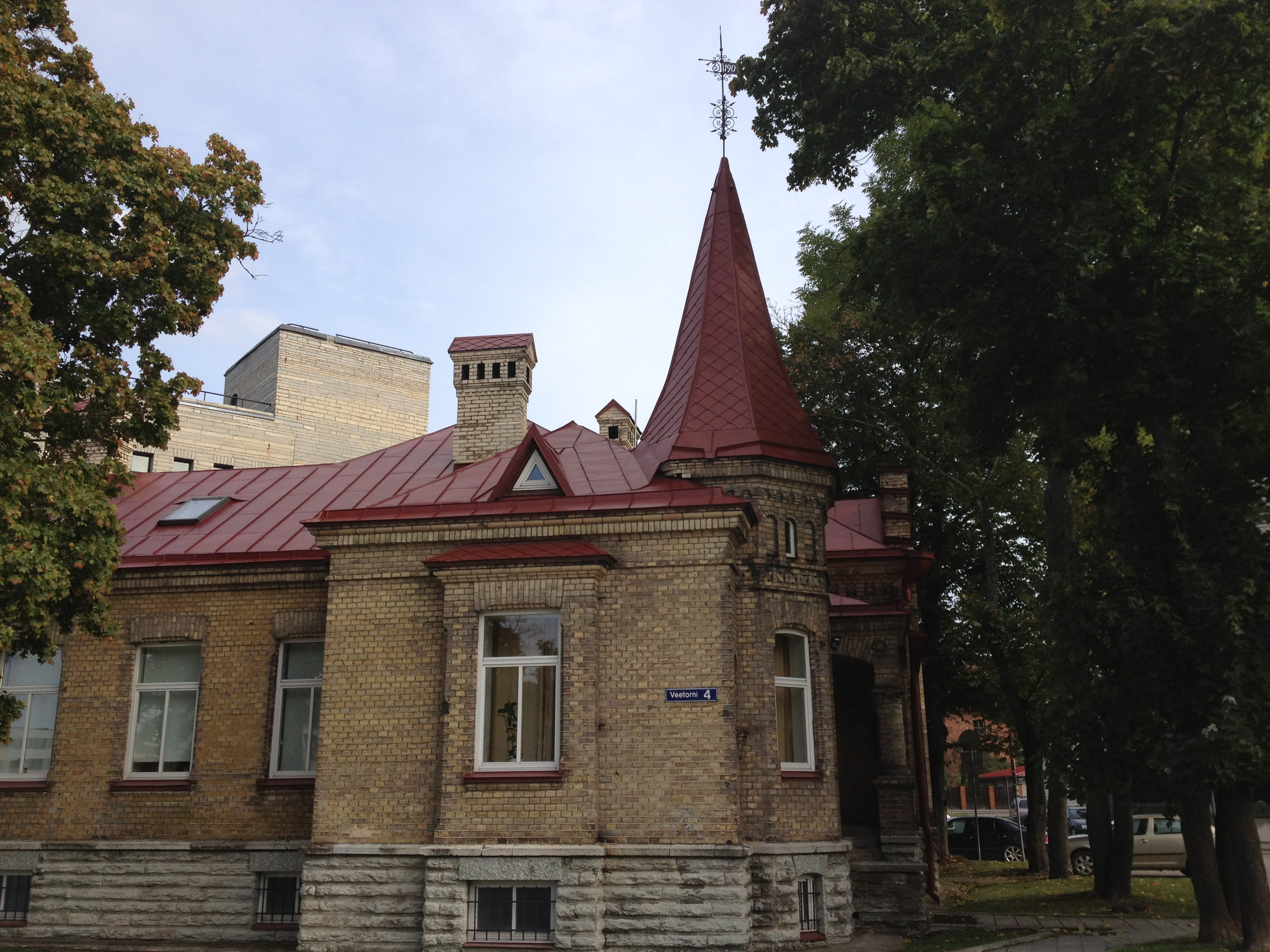 Elamu Veetorni tn 4, 1903. a.